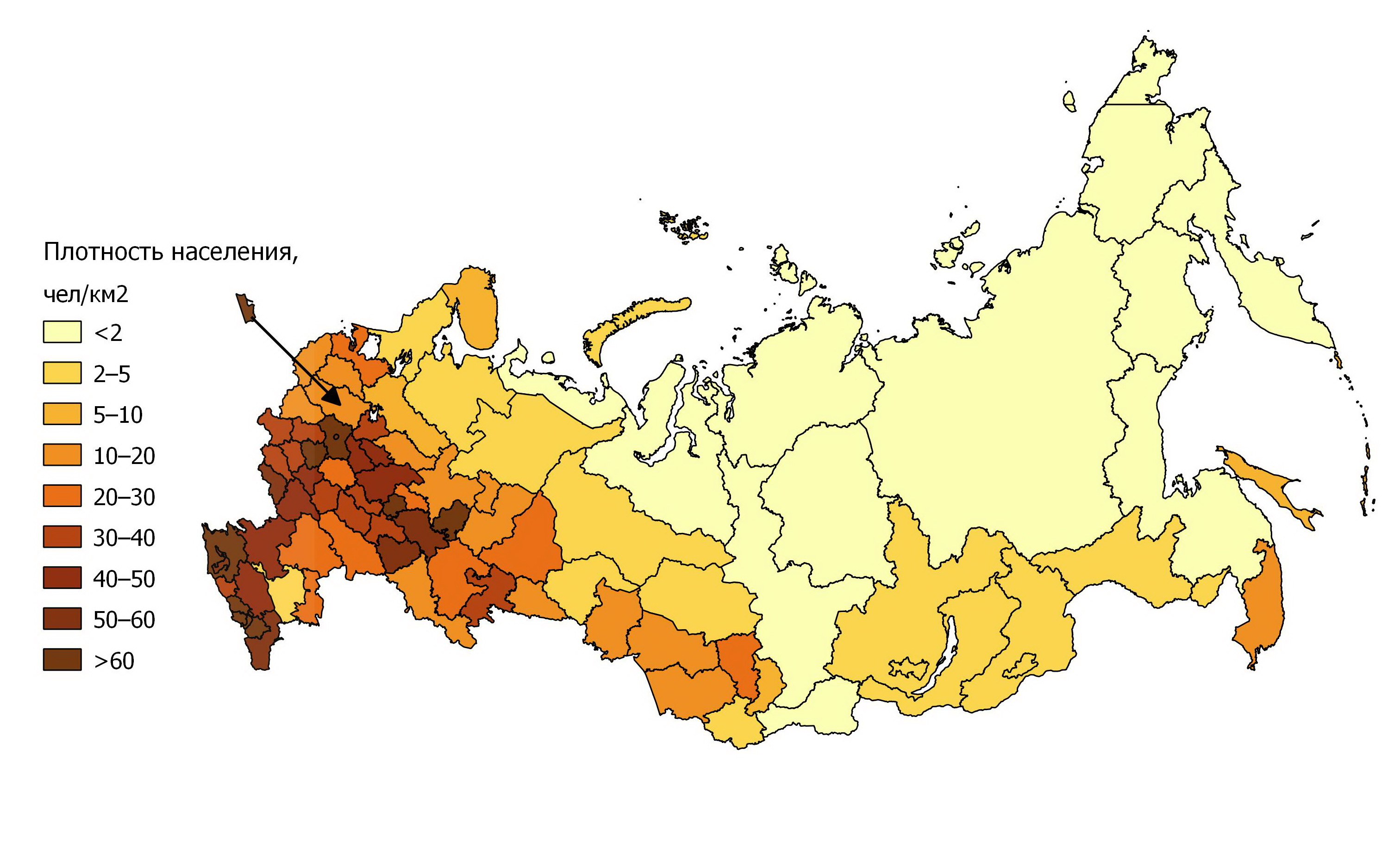 По данным за 2012 год